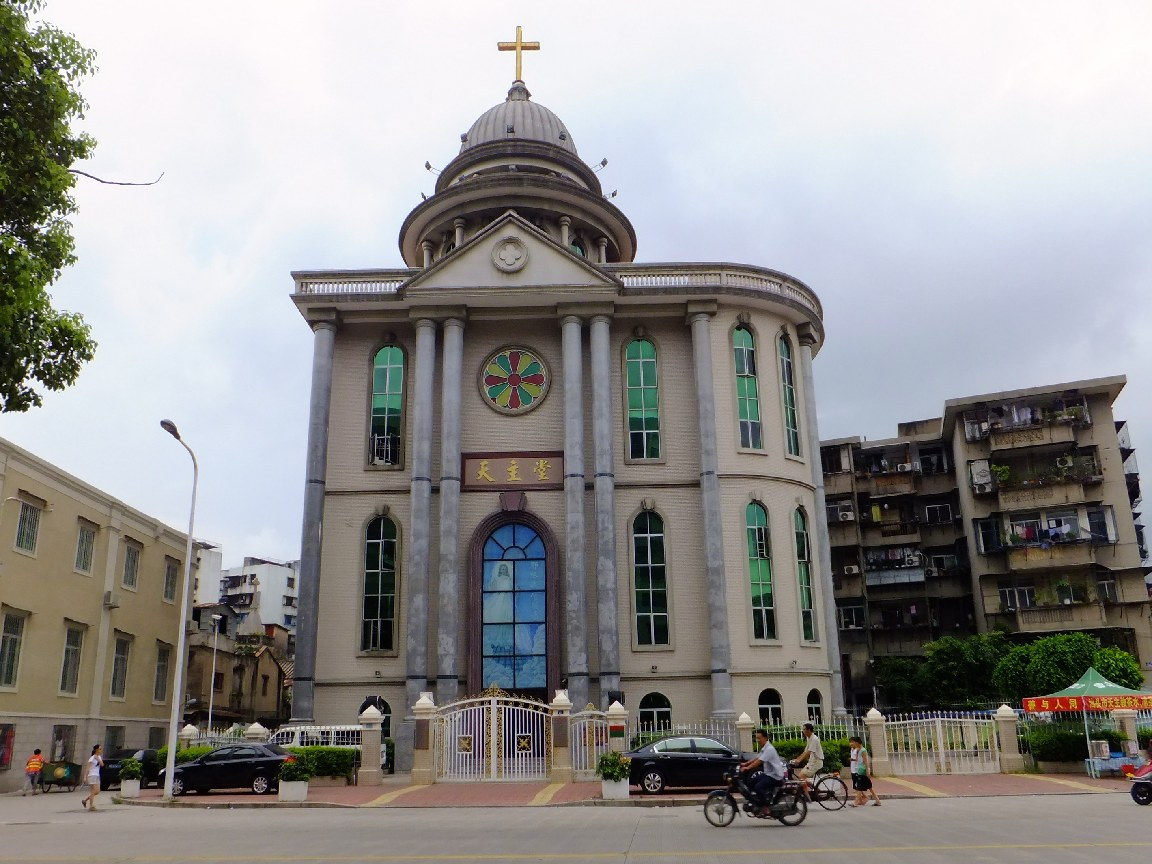 汕頭外馬路之天主教若瑟堂